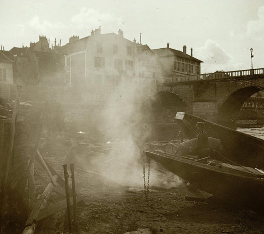 Goudronneurs calfatant des barques au bord de la Seine vue depuis les berges de Poissy en amont de l'ancien pont et du restaurant l'Esturgeon que l'on voit en arrière plan.